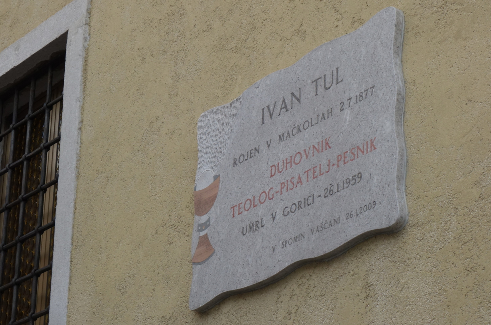 Spominska plošča Ivanu Tulu v Mačkoljah pri Trstu